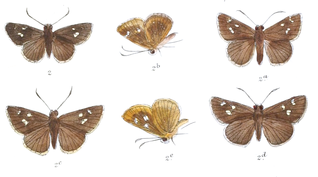 Arnetta atkinsoni